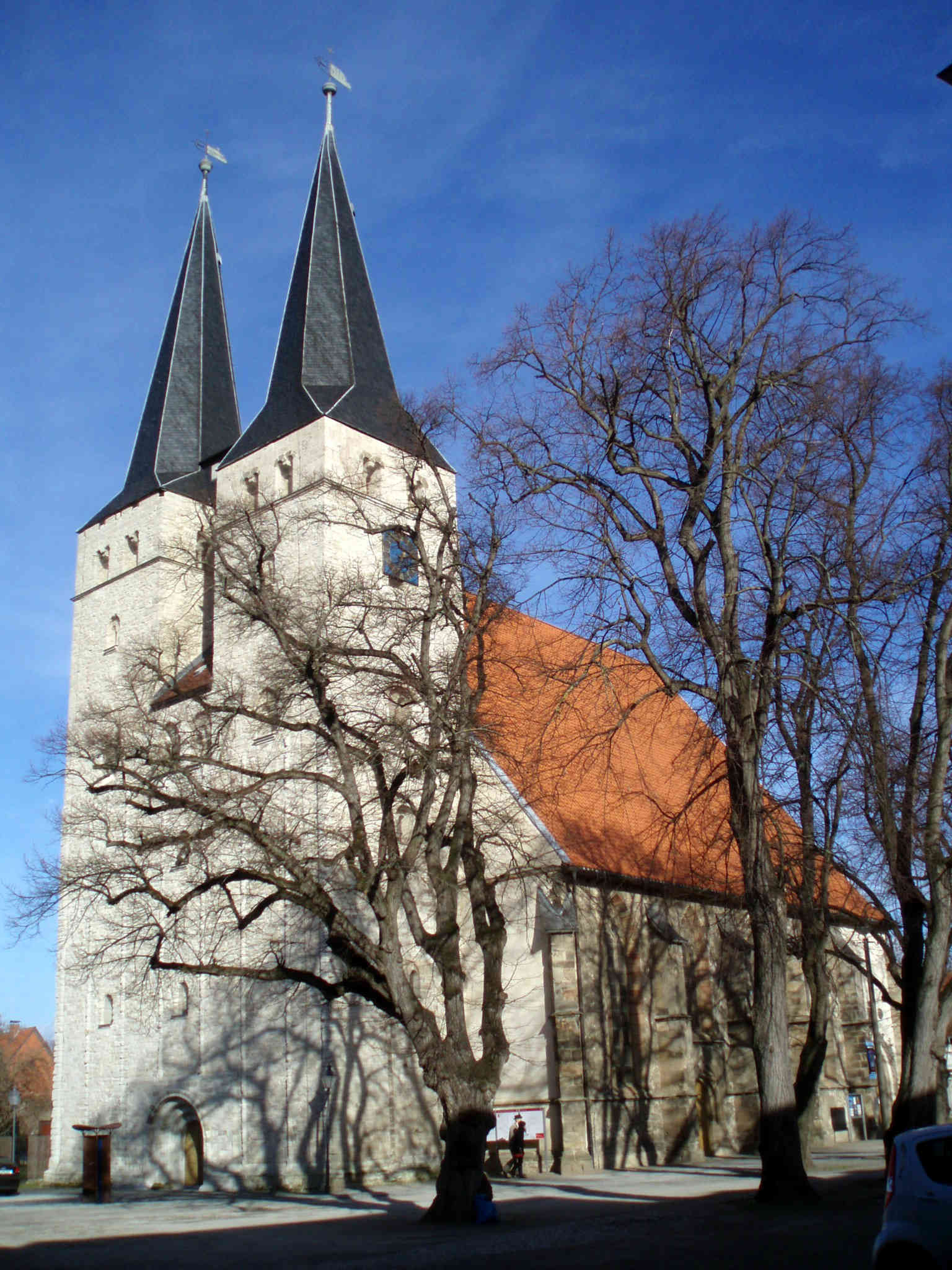 St. Stephani Osterwieck